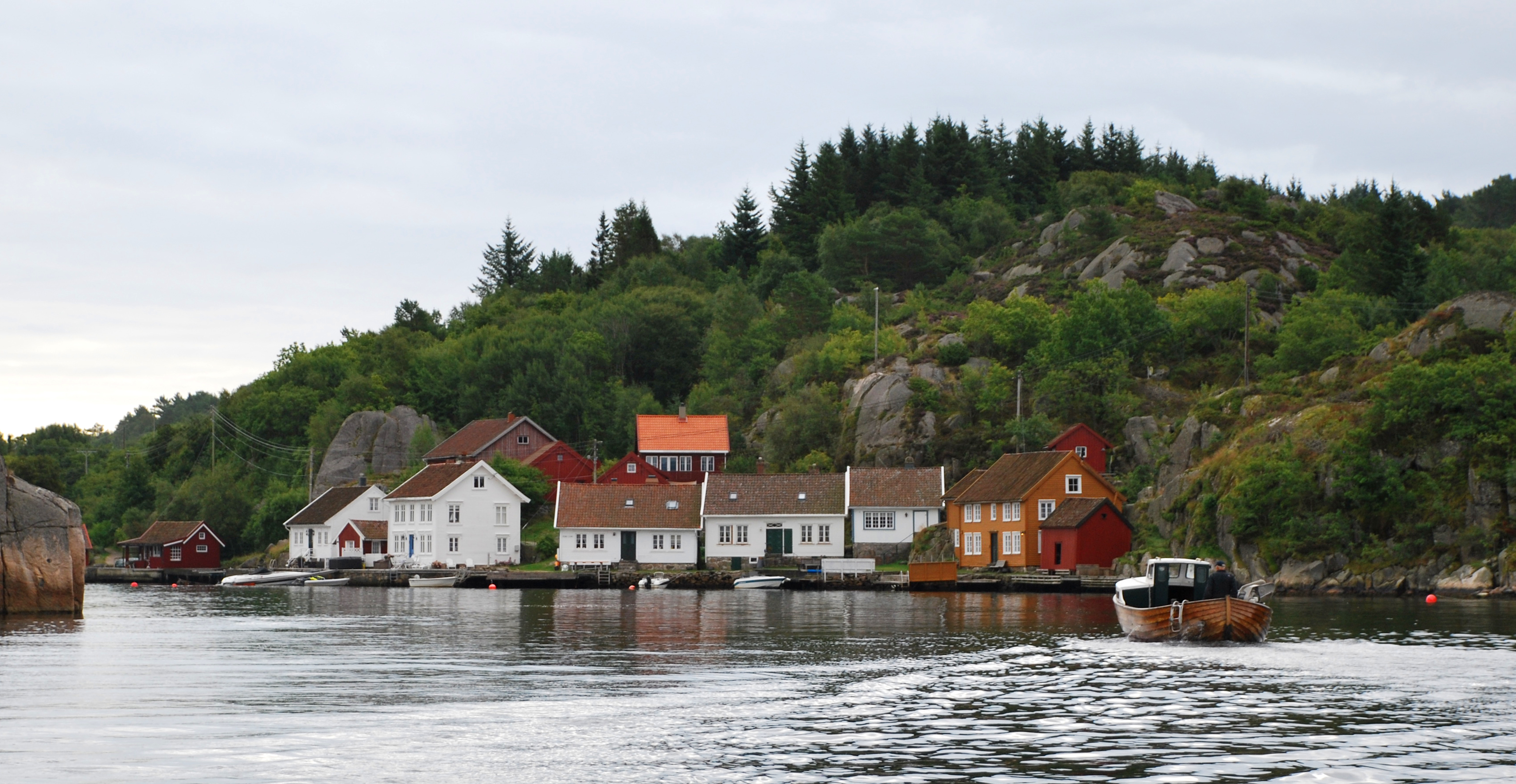 Skjernøysund med sine vakre gamle bygninger. Kort båttur fra Tregde